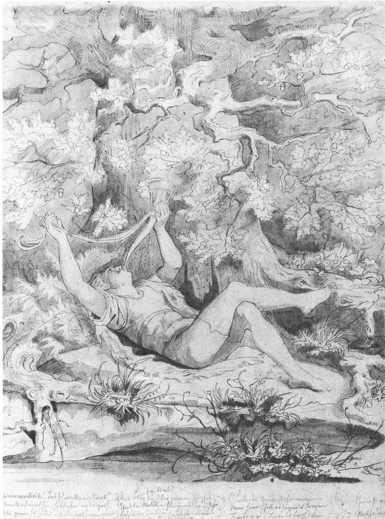 Entwurfszeichnung zu dem Bild in der Münchner Schackgalerie (erste Fassung).